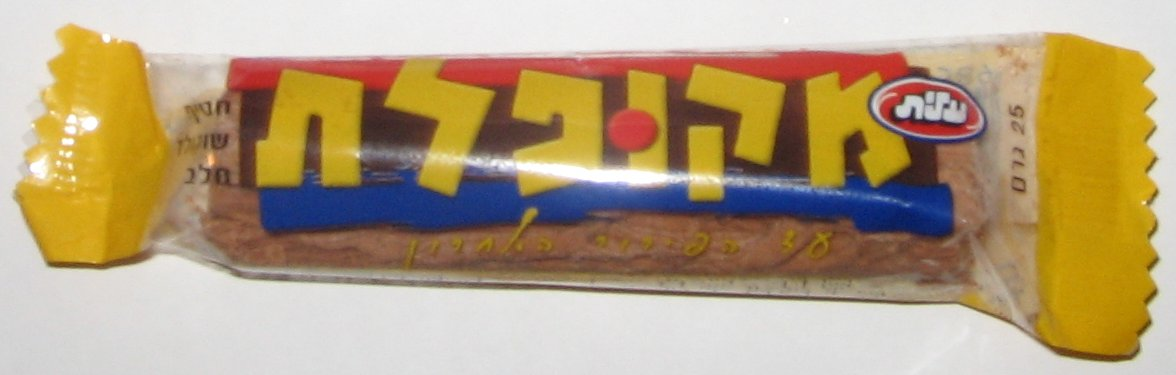 Mekupelet